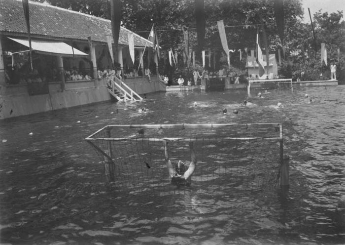 Foto. Waterpolowedstrijd, Java